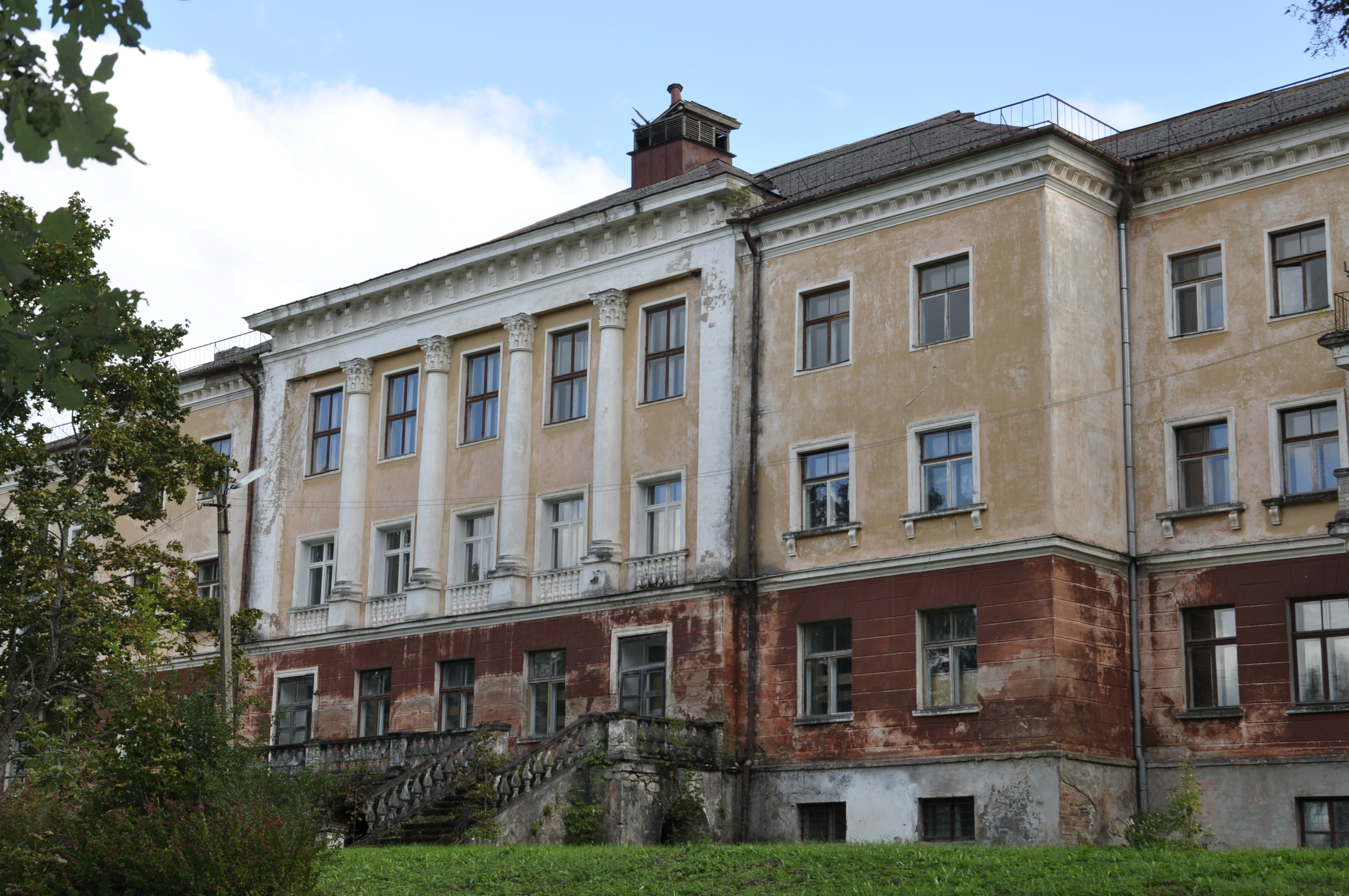 Kaagvere mõisa park